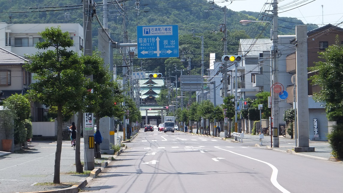 香川県高松市の八幡通り 香川県道172号川東高松線との交点付近を八幡通り終点側より撮影。奥に石清尾八幡宮。